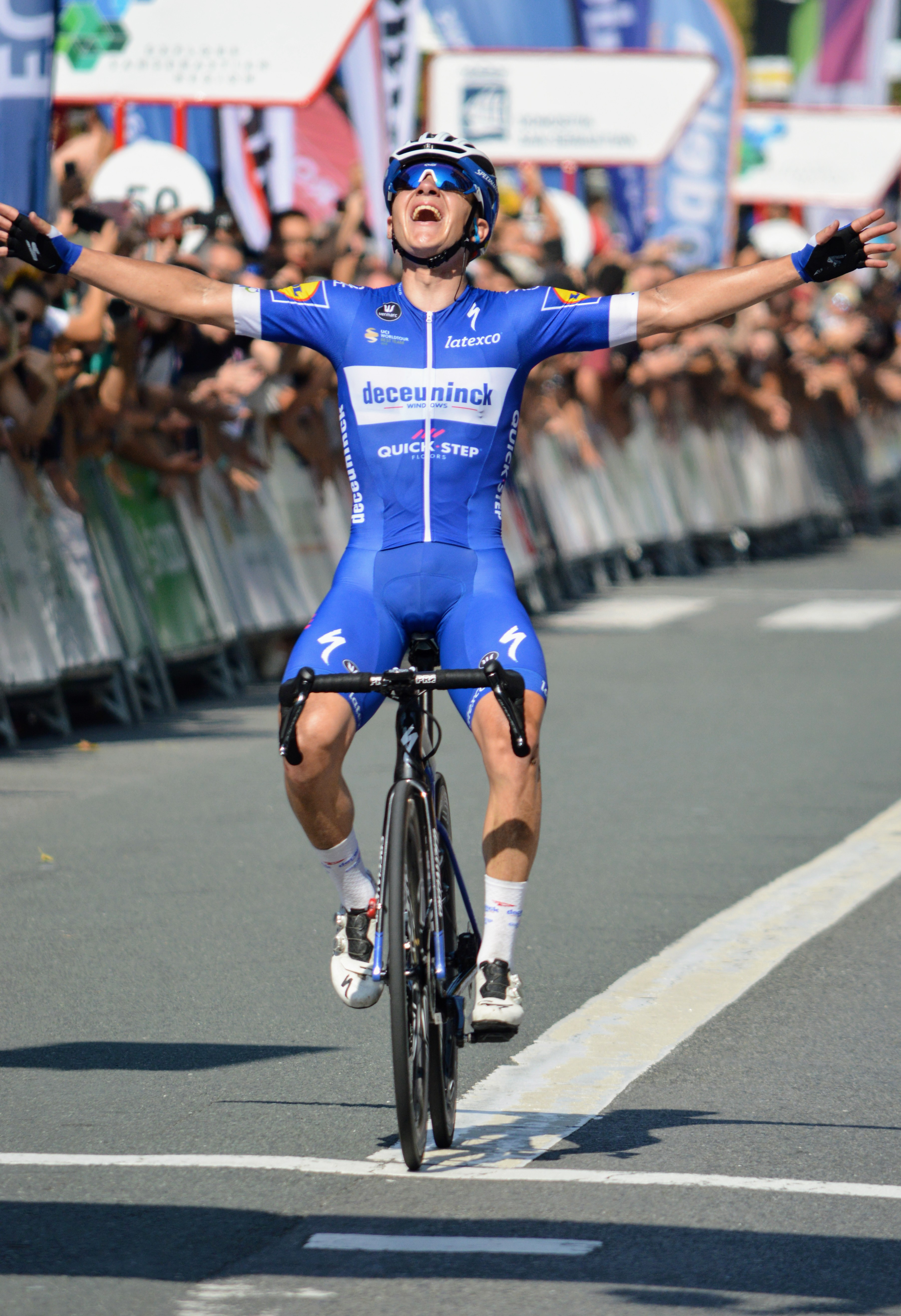 Victoire sur la classique de San Sebastian (world tour)